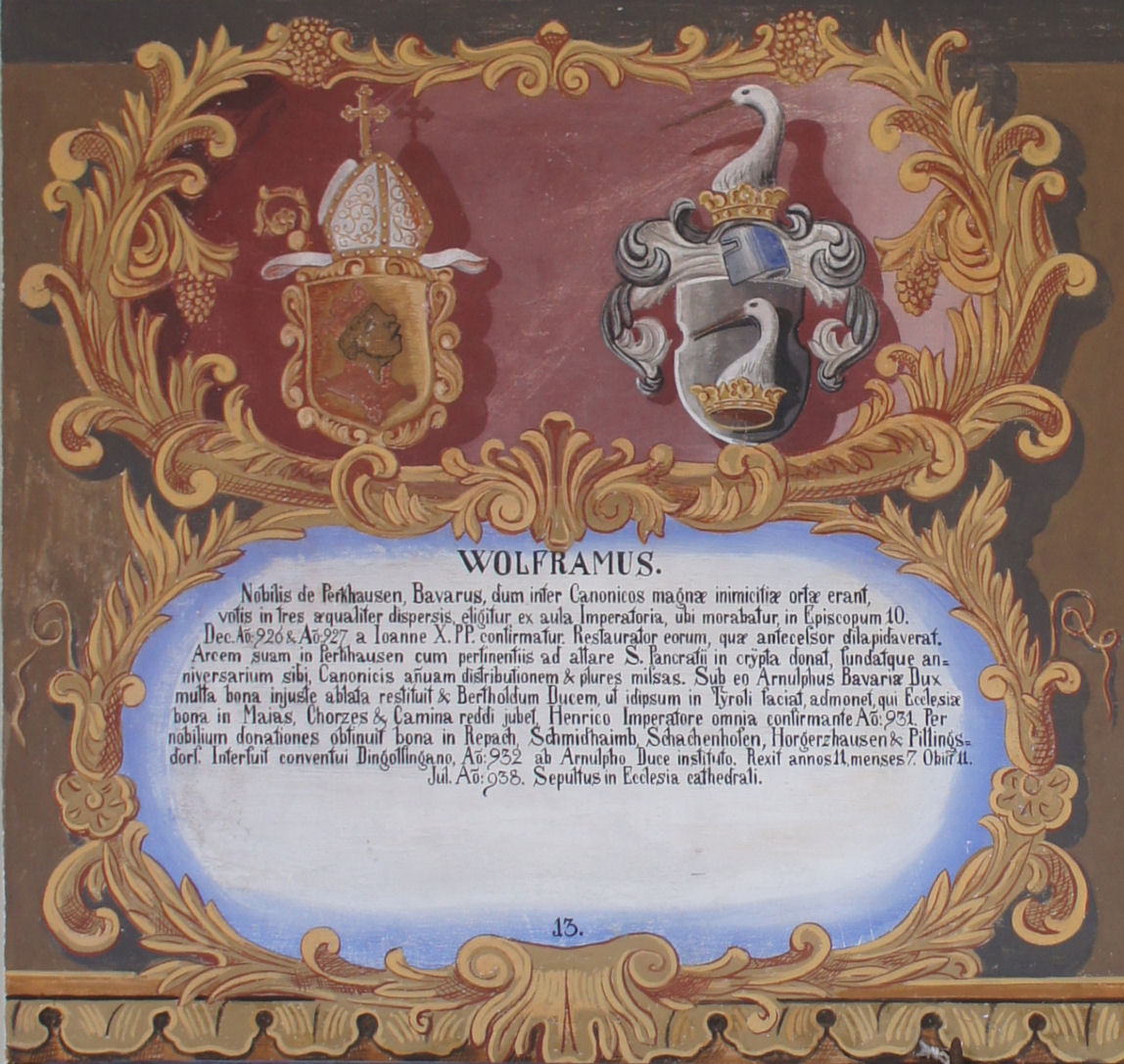 Wappentafel von Wolfram, Bischof von Freising, im Fürstengang zwischen Fürstbischöflicher Residenz und Freisinger Dom. Links das geistliche, rechts das persönliche Wappen, darunter ein lateinischer Text mit kurzer Biographie.